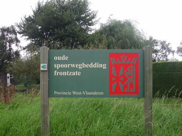 Spoorwegberm